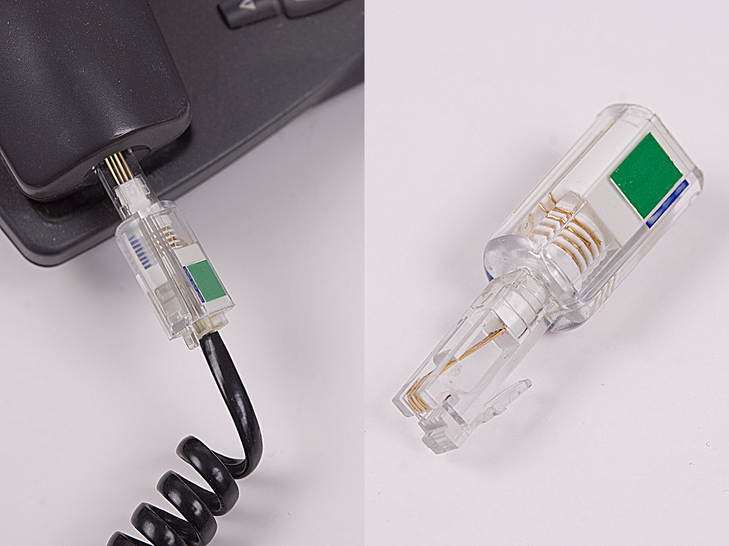 Verdrehschutz für Telefonhörerkabel